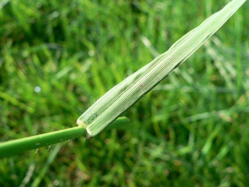 Bromopsis erecta leaf